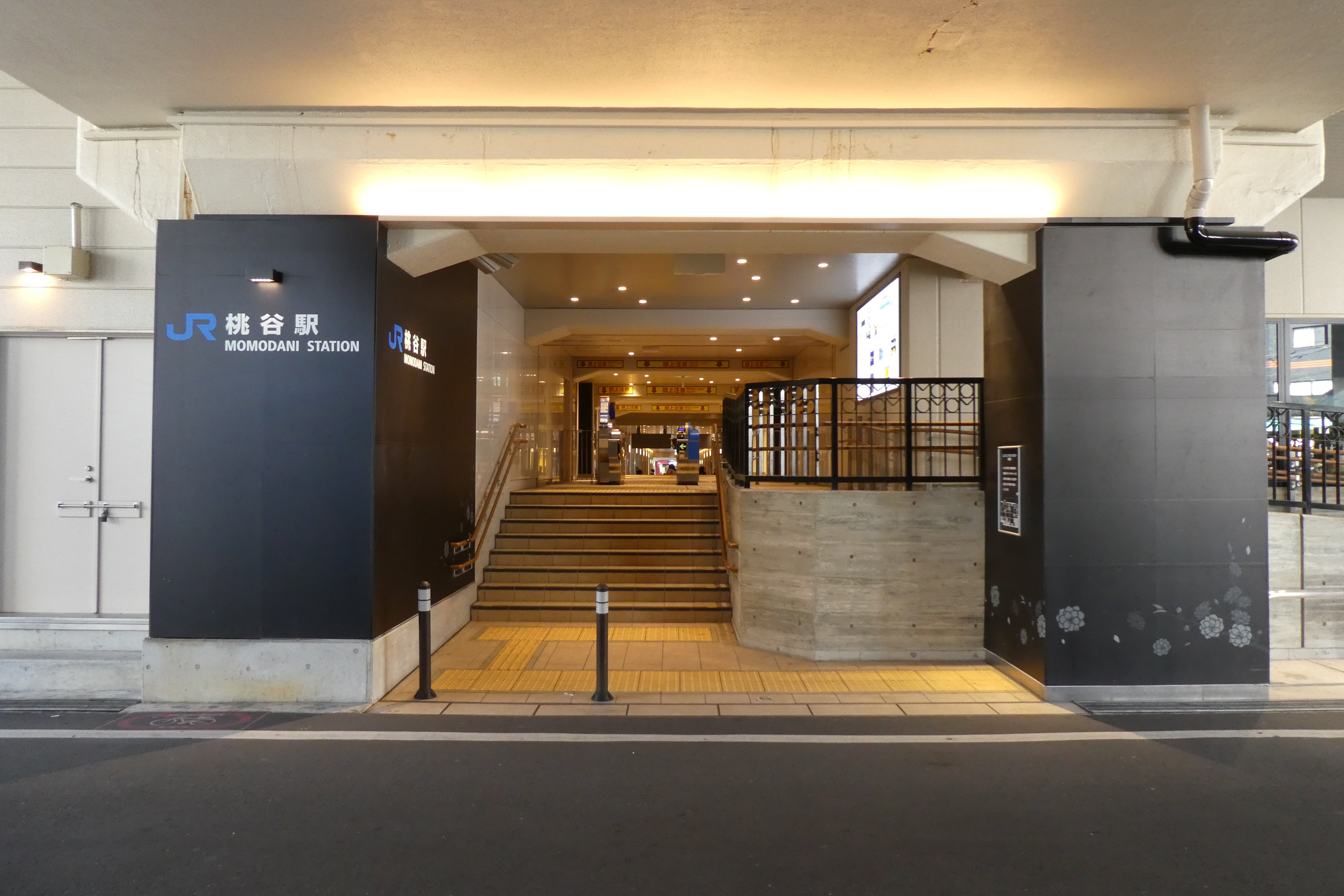 大阪環状線 桃谷駅 北口改札